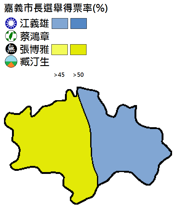 1997年嘉義市長選舉